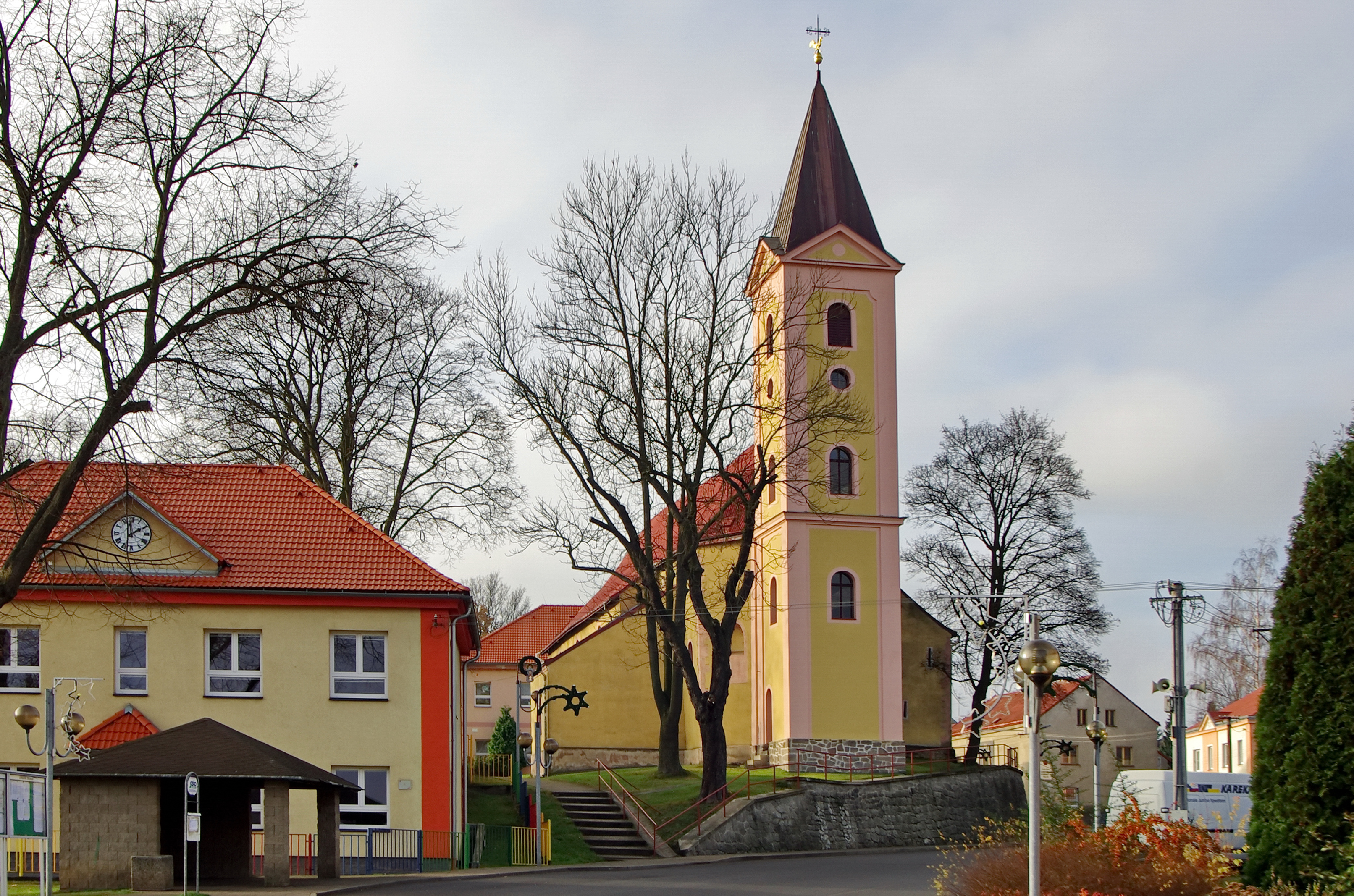 Kostel svatého Jiljí, náves, Lomnice (okres Sokolov).